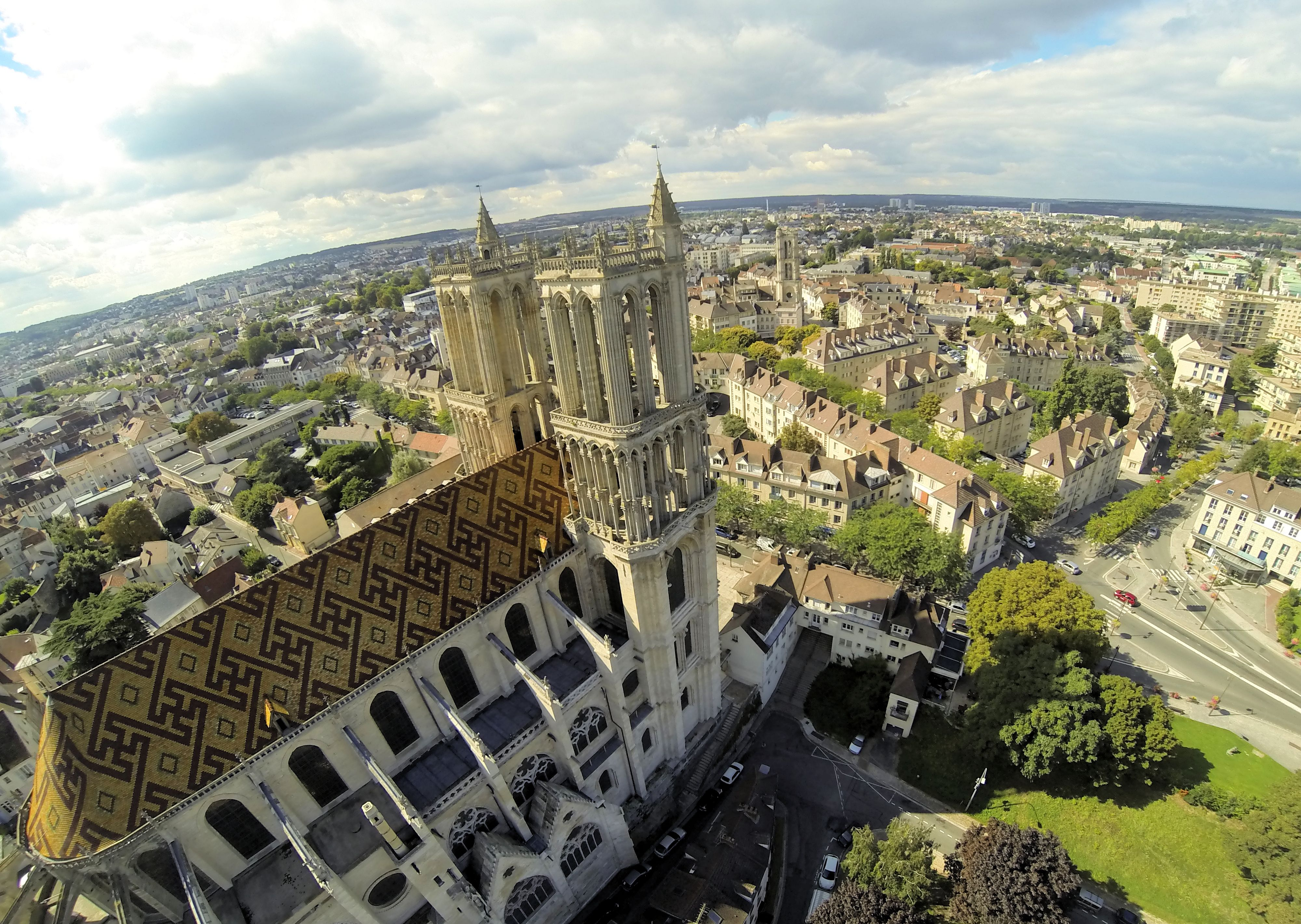 Collegiale de Mantes la jolie .